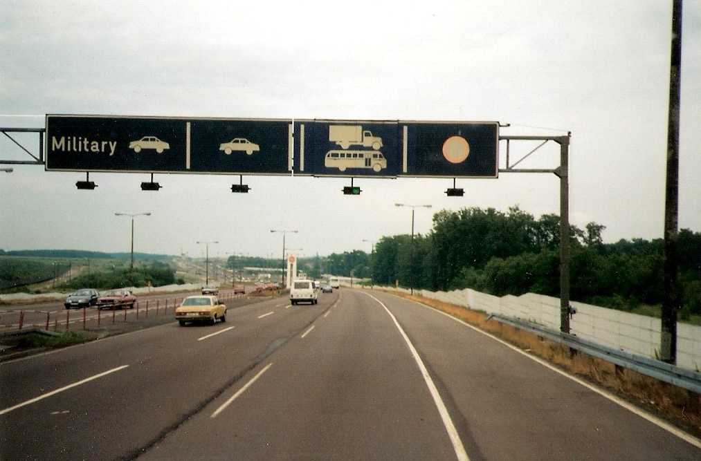 DDR-Grenze Helmstedt - Marienborn